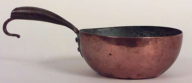 Vannøse med blad av kobber og hank av jern. Lengde 33 cm. Norsk Folkemuseum, NF.1951-0397.